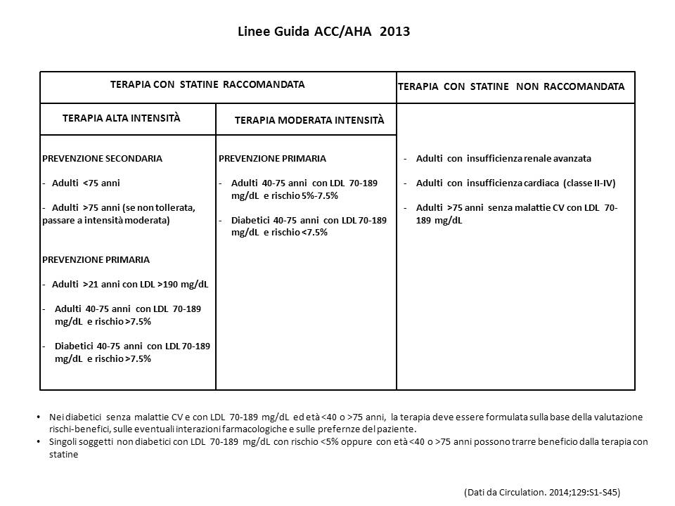 Linee guida americane per il trattamento della colesterolemia